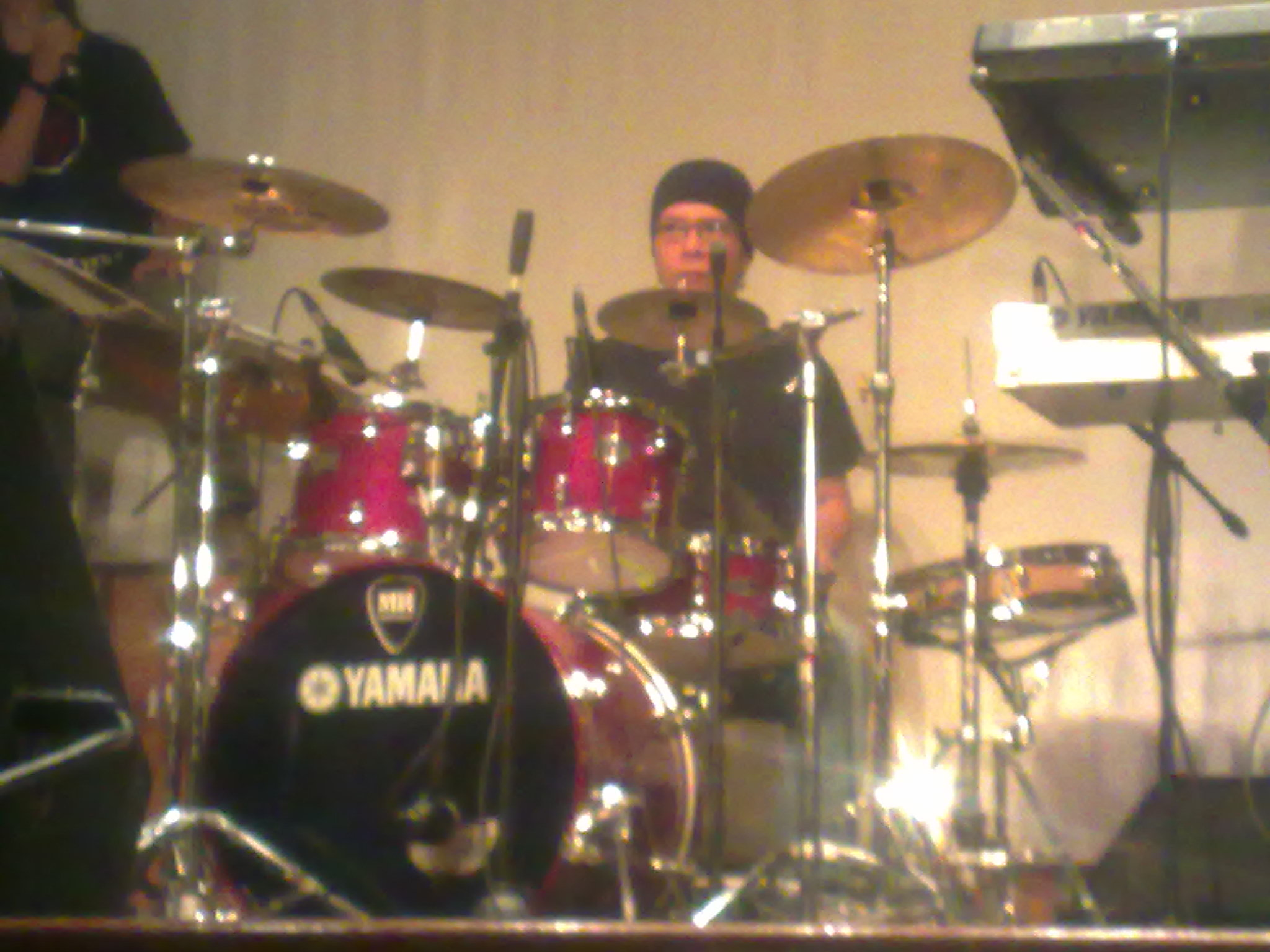 Arlex Cifuentes Celebracion 15 años Legend Maker